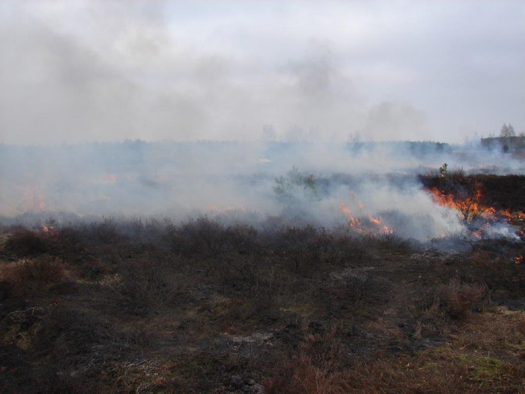 Kontrolliertes Brennen in der Retzower Heide